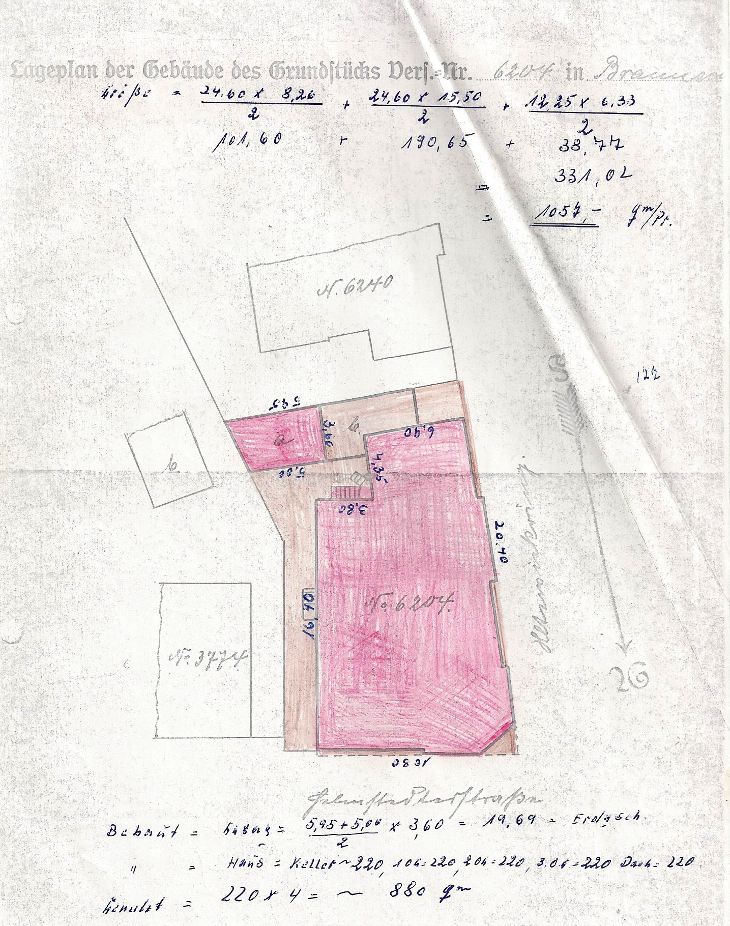 Altewiekring 70, Grundbuchauszug mit handschriftlichen Eintragungen ca. 1970.